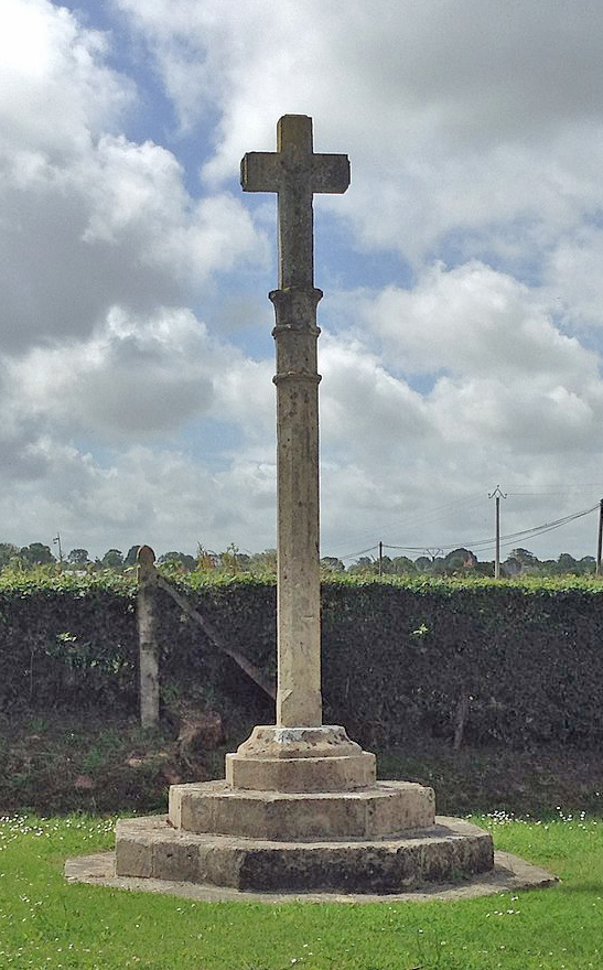 La croix des Anglais - cliché ASPBNH©